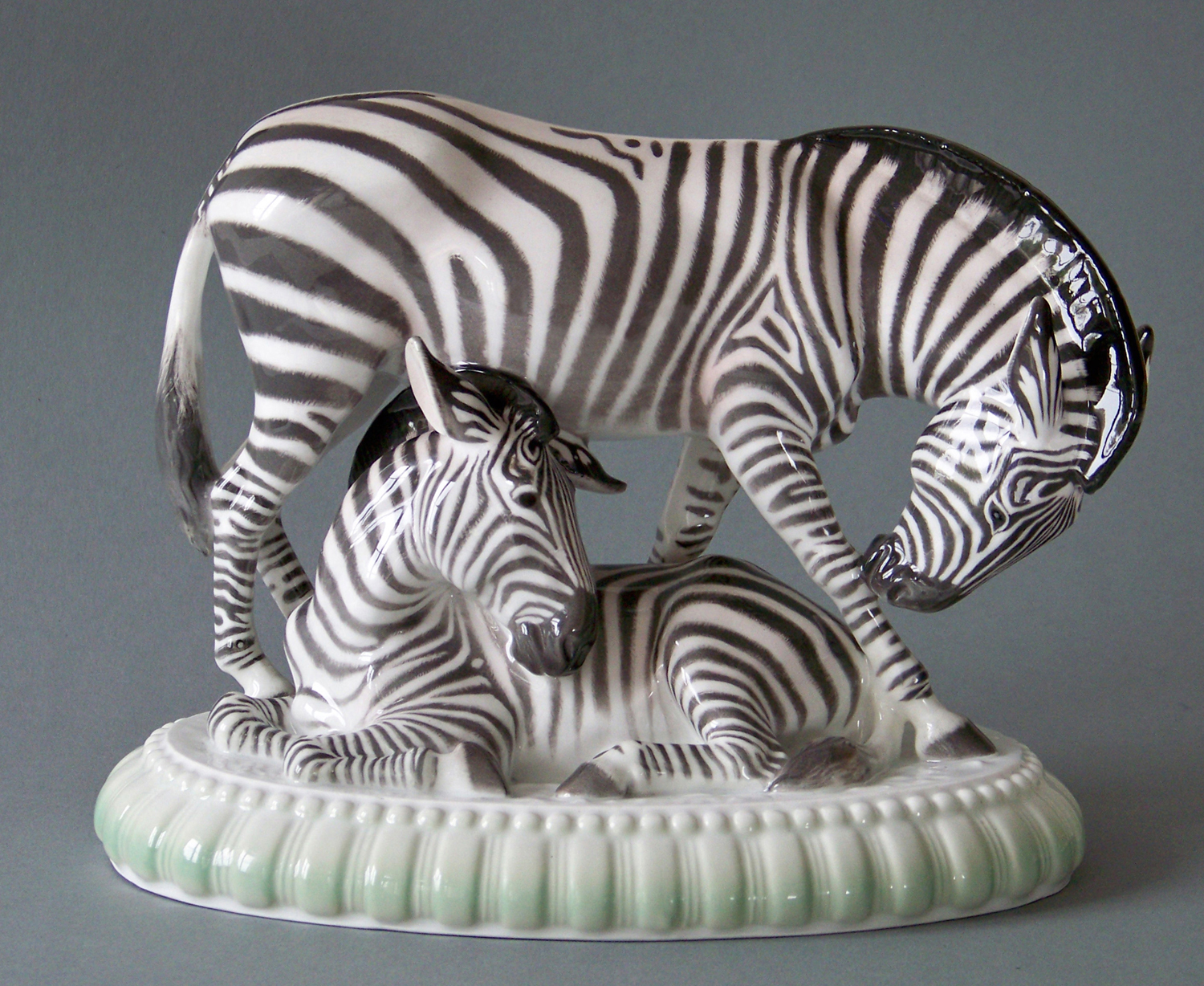 Anton Puchegger: Zebragruppe, Entwurf 1912 Ausführung KPM Berlin 1920 Bröhan-Museum Native nameBröhan-MuseumLocationBerlinCoordinates52° 31′ 08″ N, 13° 17′ 43″ E Established1973WebsitehpAuthority control VIAF: 132026004 ISNI: 0000 0001 2364 1925 SUDOC: 035768363 BNF: 133352501